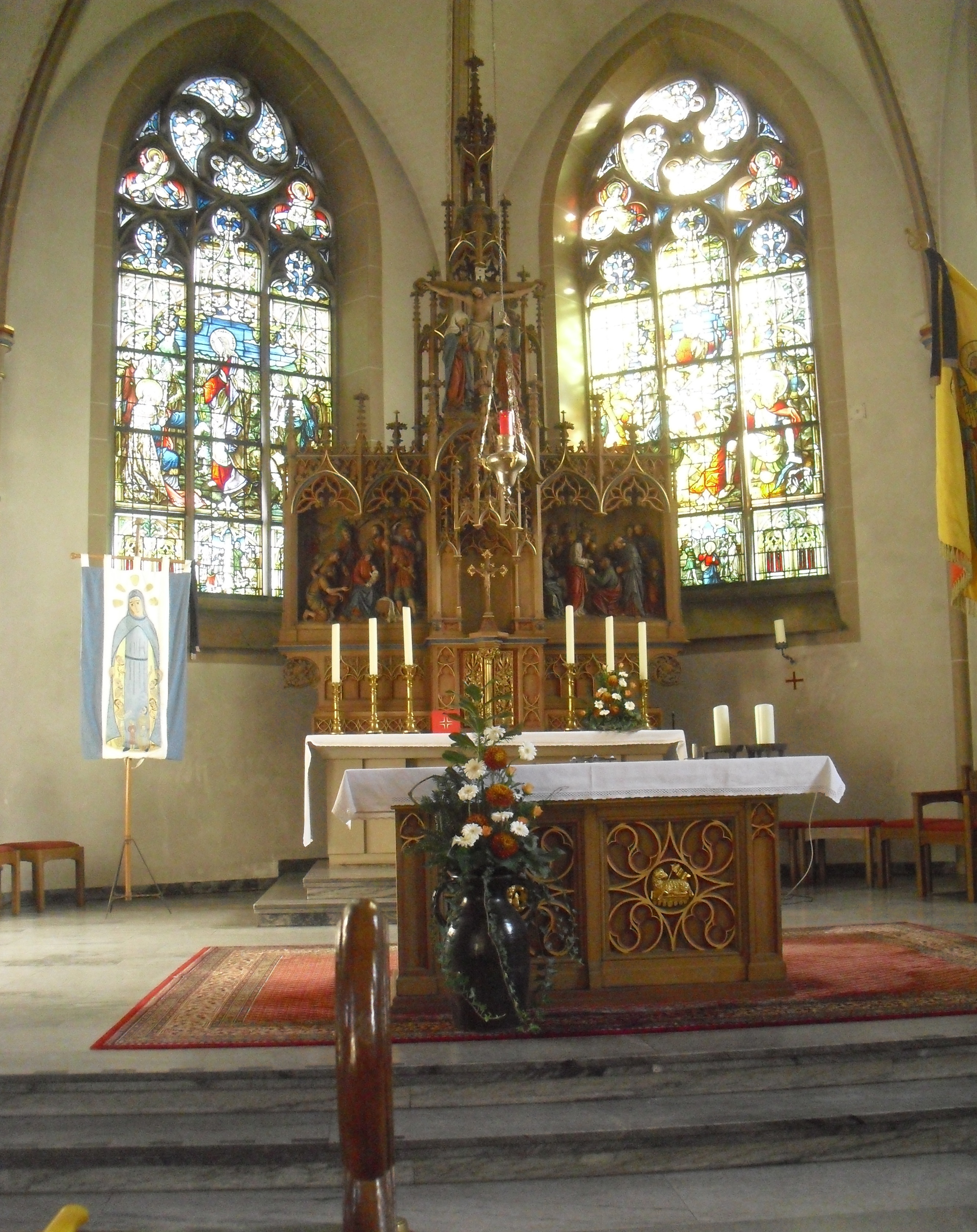 Altar der kath. Pfarrkirche St. Peter und Paul in Scharmede